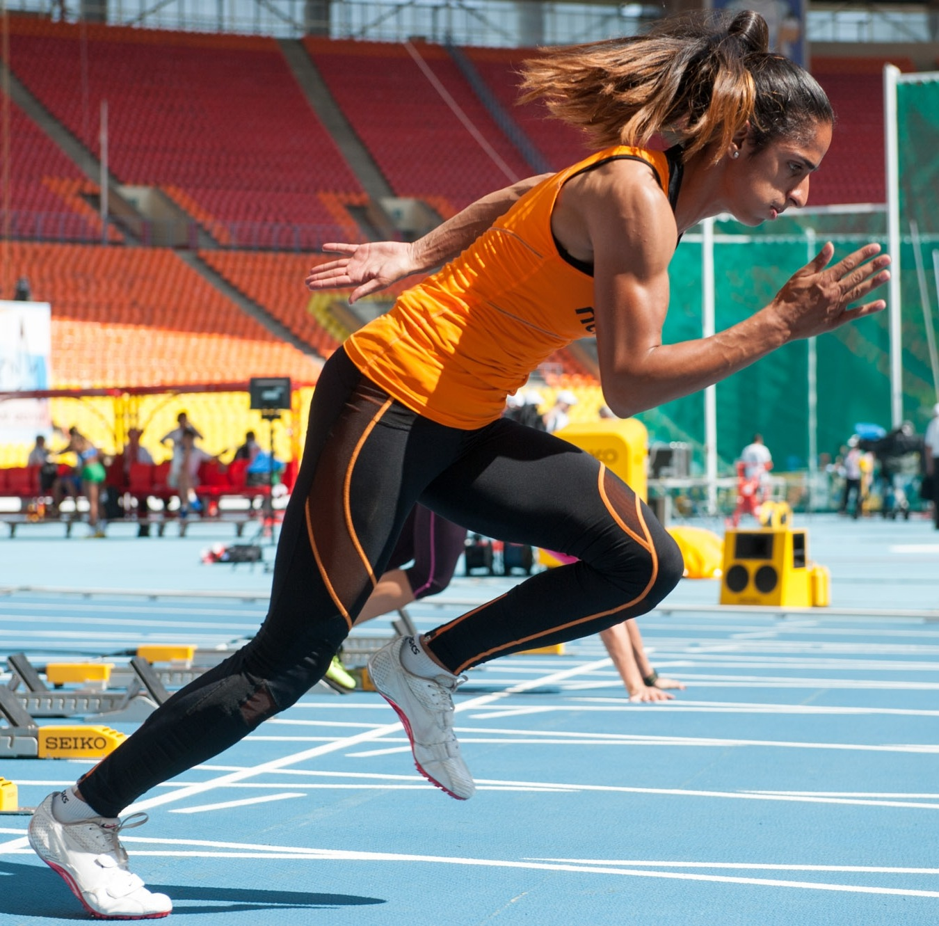 Madiea Ghafoor tijdens de WK van 2013 in Moskou